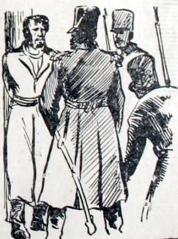 Ilustración que representa a Vicente San Bruno junto a los Talaveras de la Reina, durante la reconquista española en Chile.